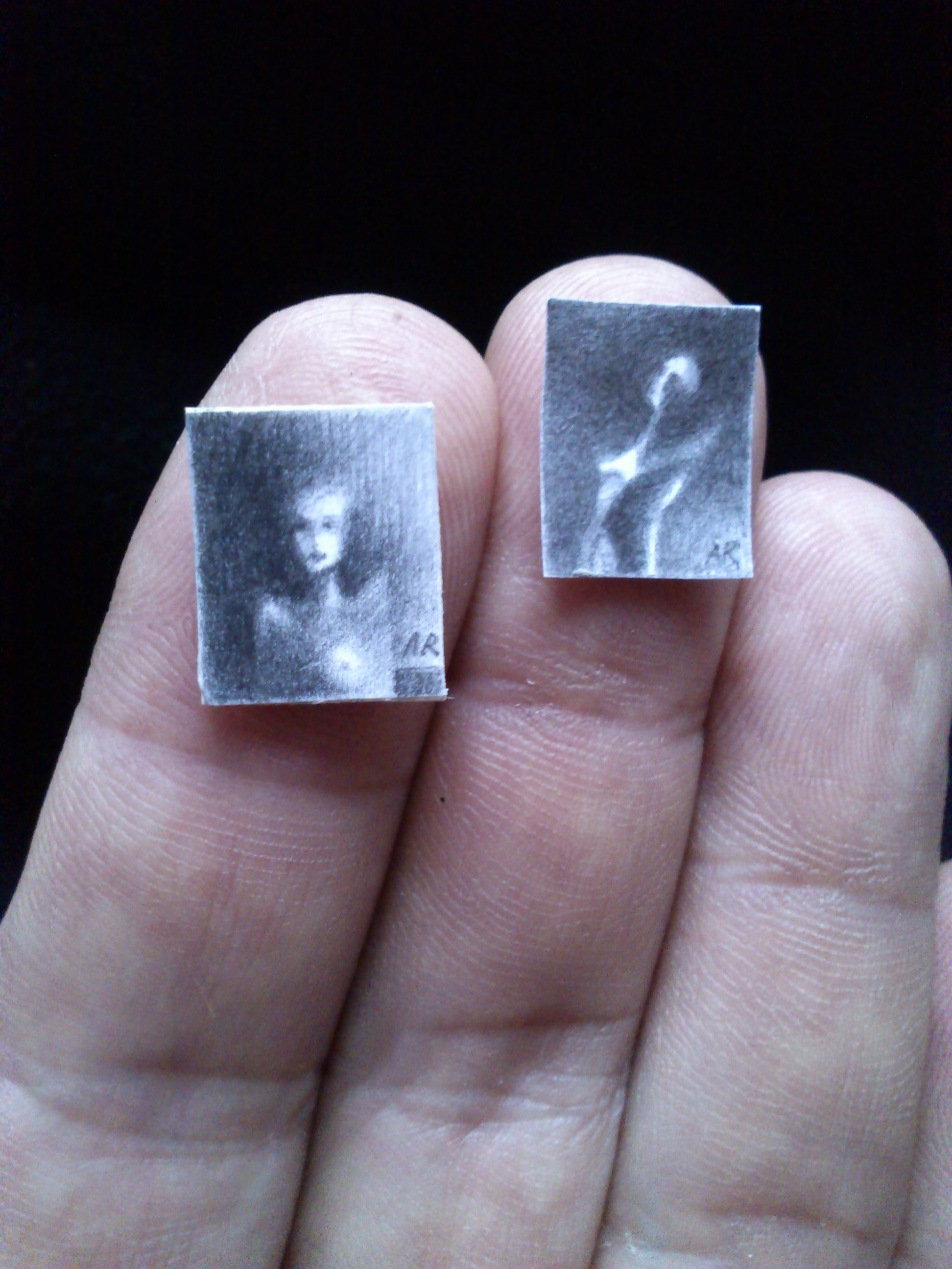 Cykl CZARNY ŁABĘDŹ - Agata Ruman 1